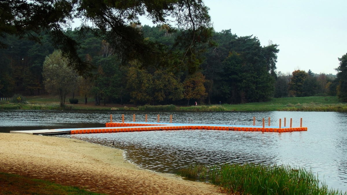 Zdjęcie zrobiono jesienią tego roku.